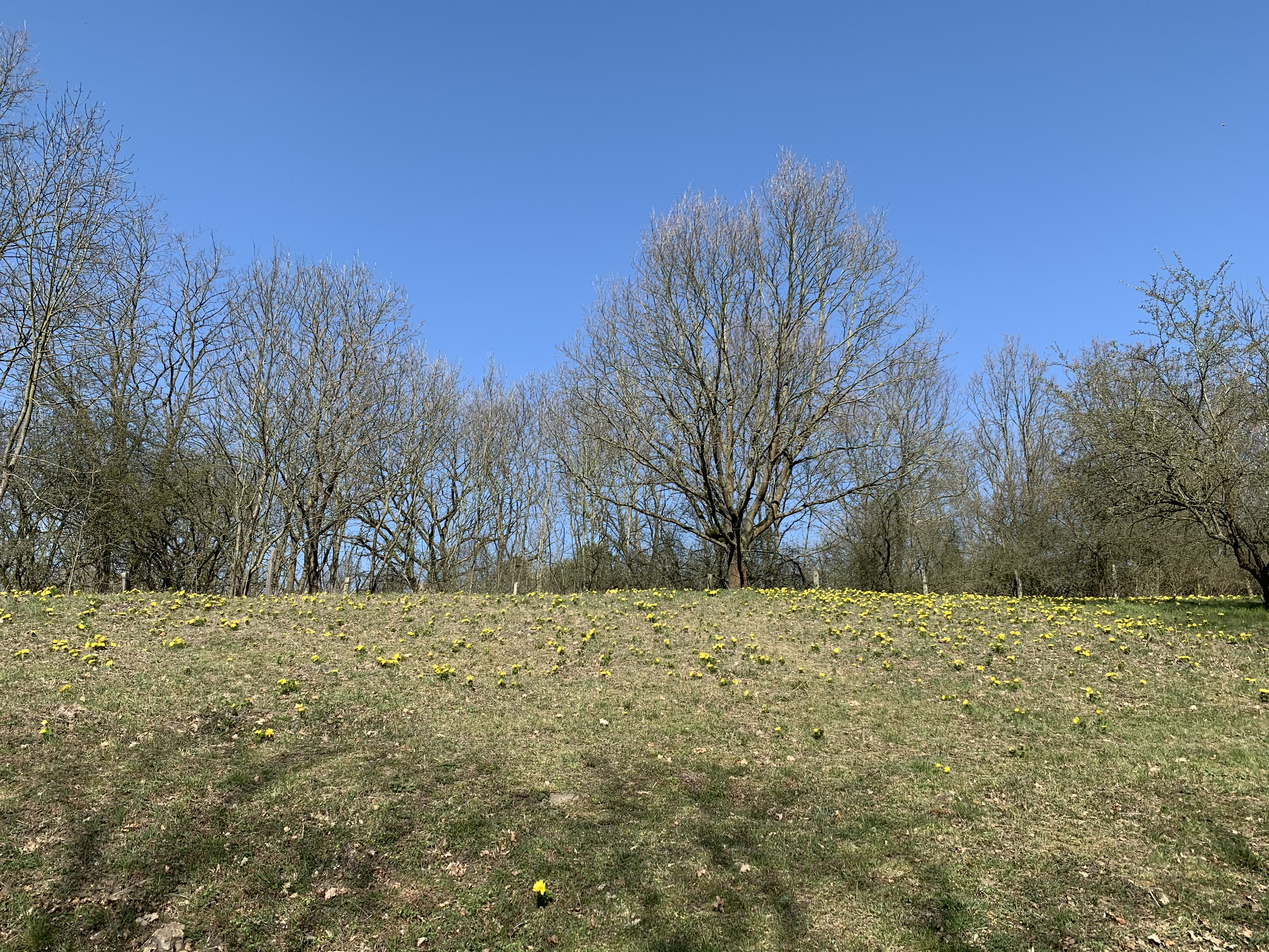 Die Frühlings-Adonisröschen wachsen auf den Oderhängen von Lebus. Das Amt Lebus bietet im Frühjahr eine Wanderung zu diesen Hängen an ( Die Hänge sind jedoch auch ohne Führung zu besuchen.